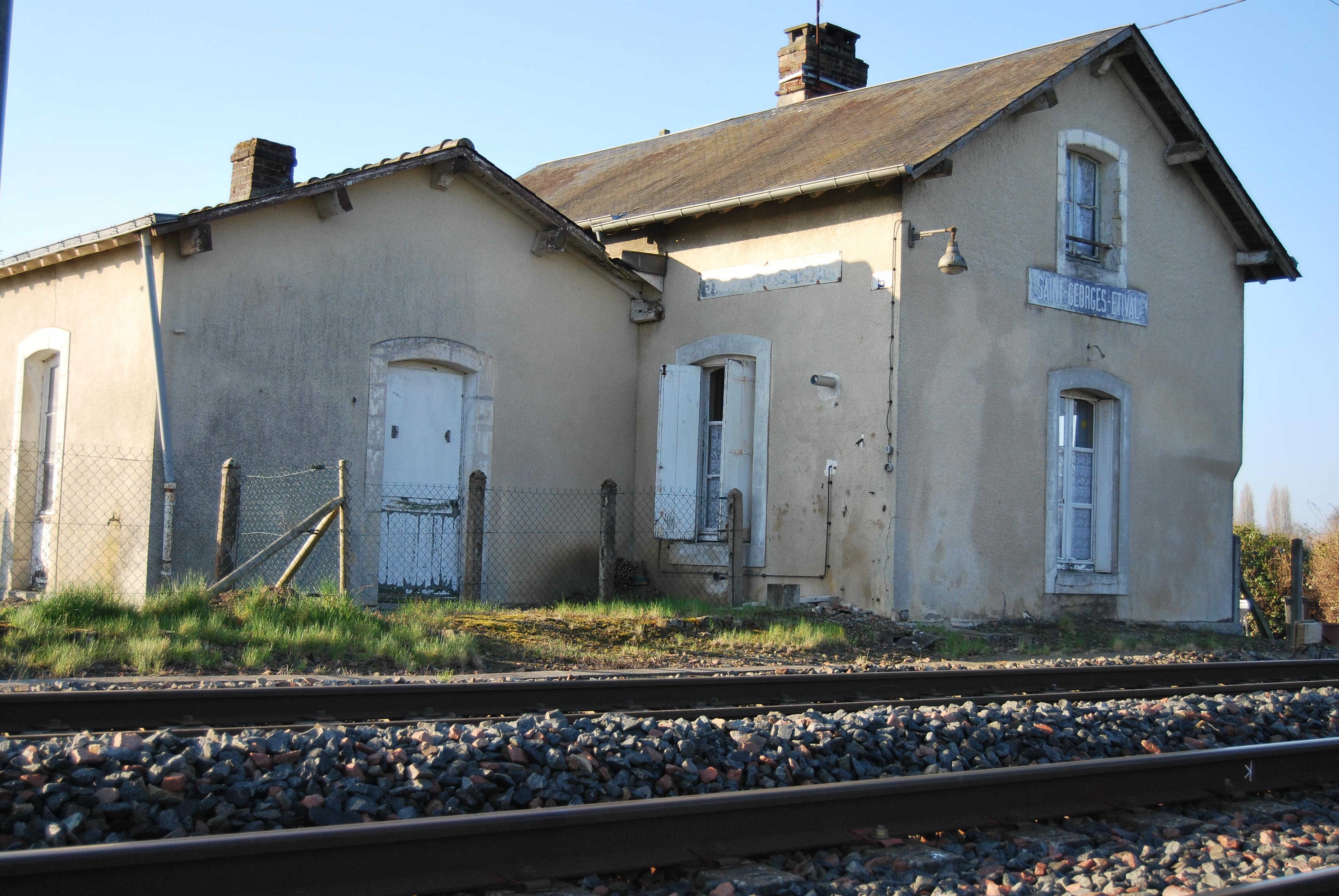 Gare de Saint-Georges-du-Bois dans le département français de la Sarthe, en avril 2010.